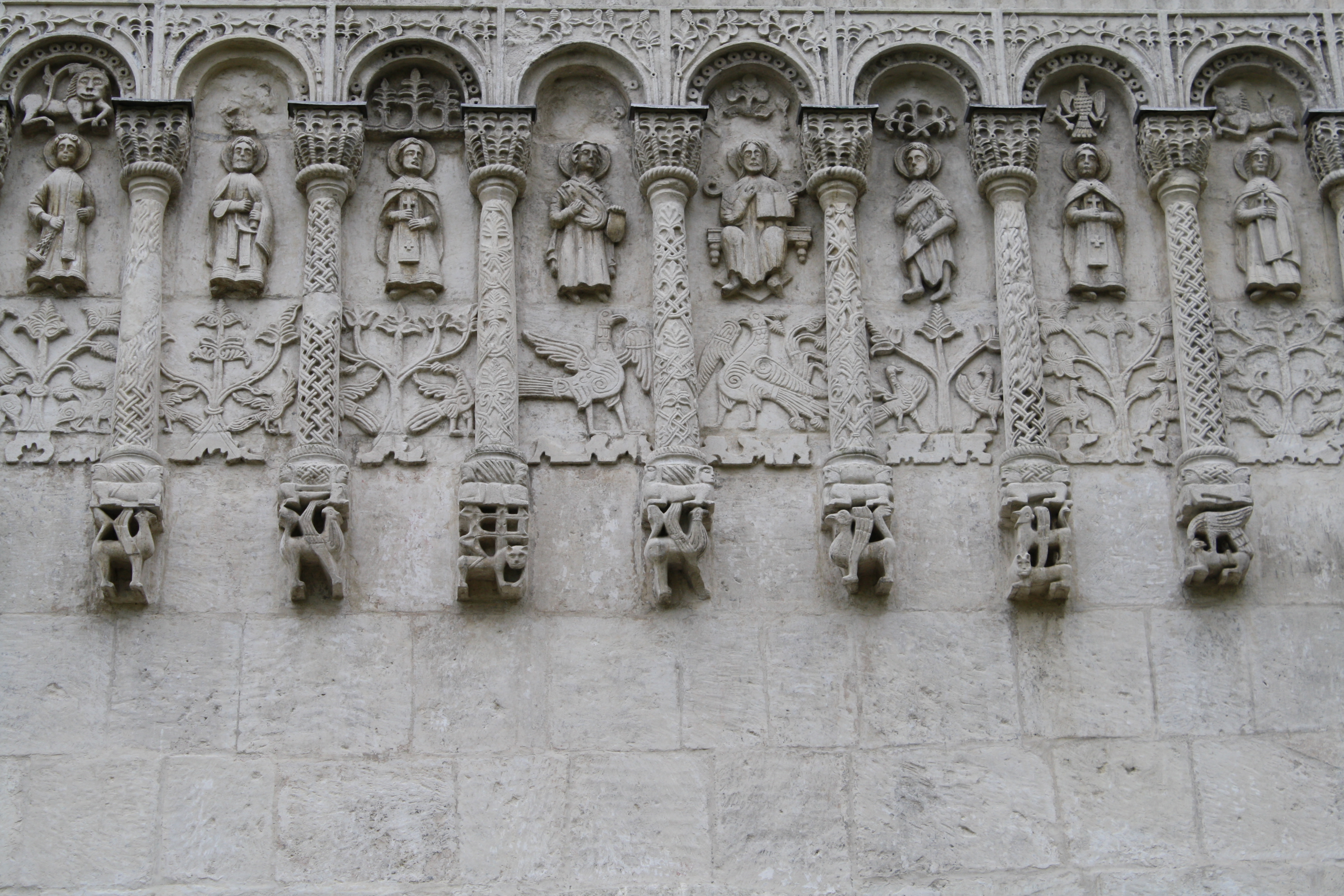 Dormition Cathedral ornament. Vladimir. Russia. Орнамент Успенского Собора. Владимир. Россия